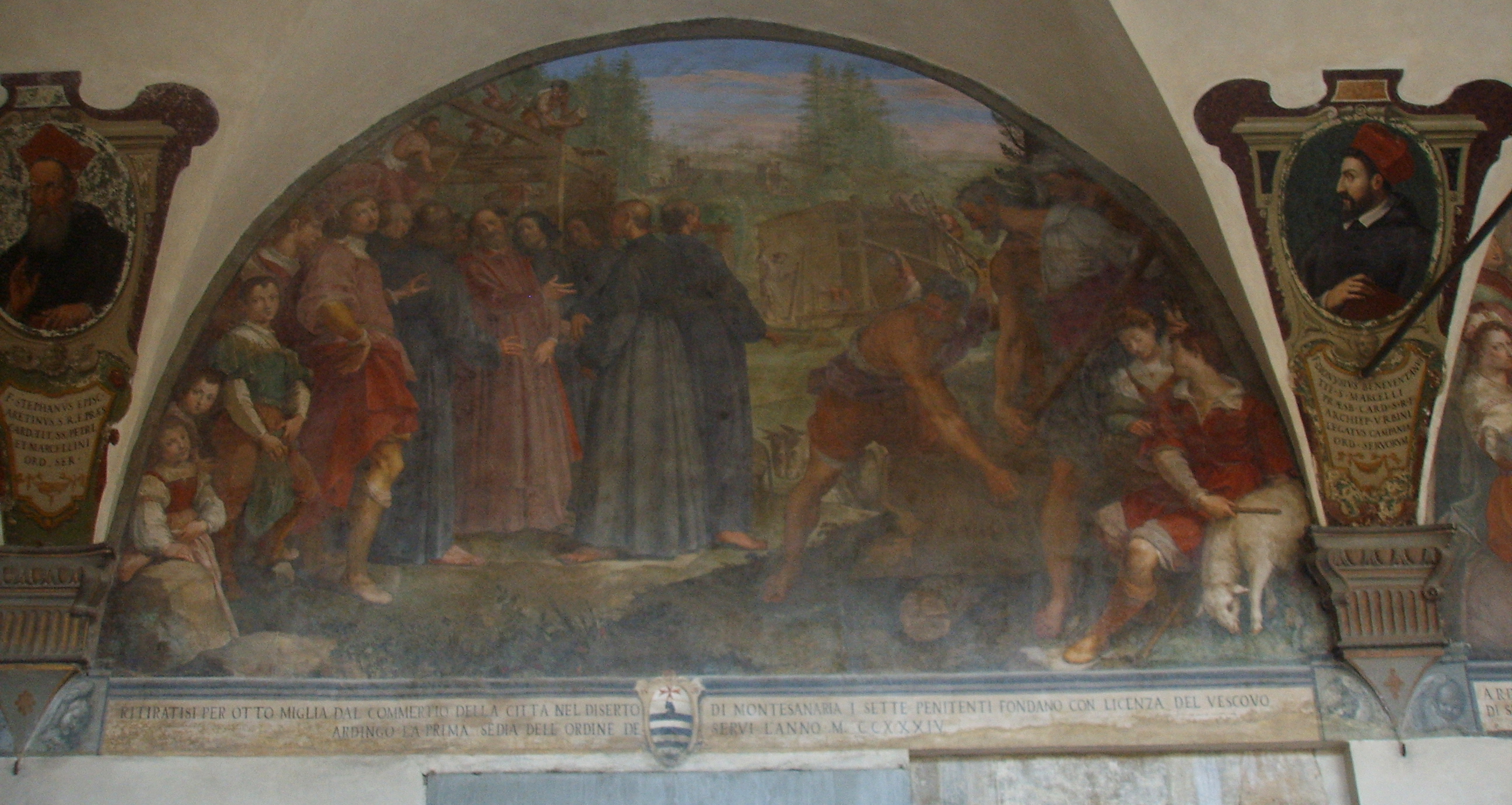 Santissima annunziata chiostro grande bernardino_poccetti,_bernardino_poccetti,_fondazione_del_monastero_di_monte_senario in Florence, italy